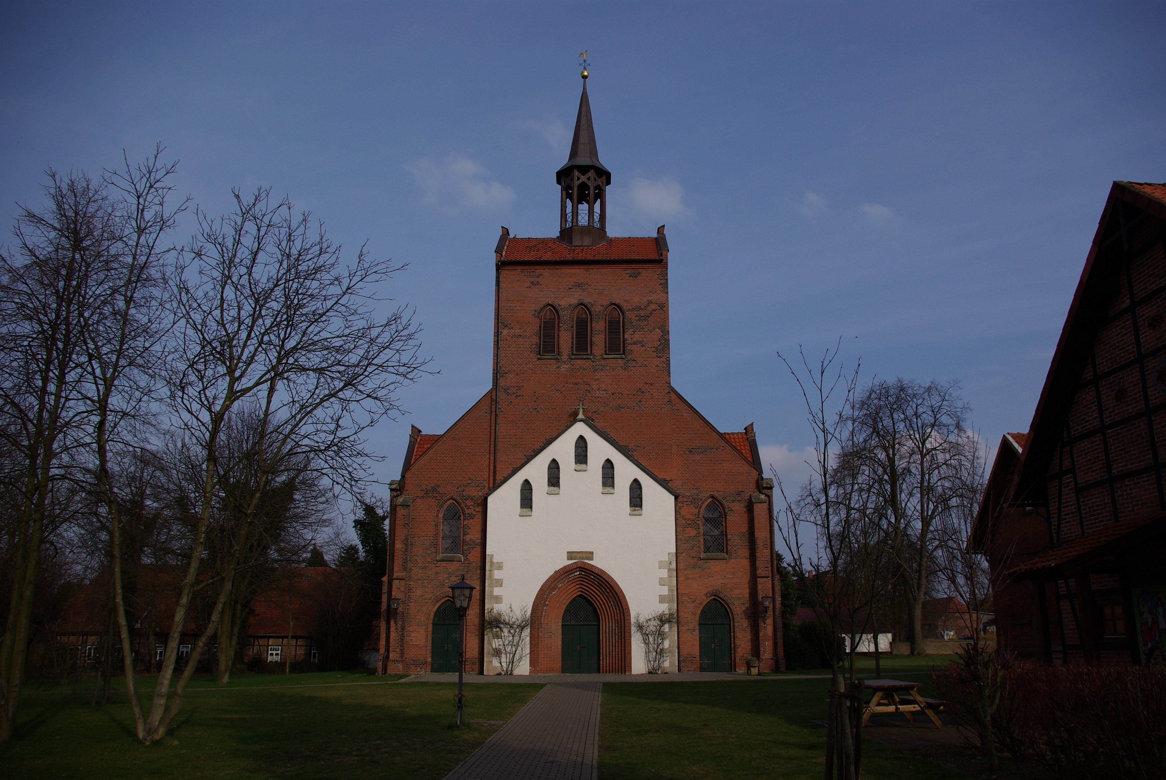 Leiferde in Niedersachsen. Das Bild zeigt die Kirche St. Vit in Leiferde.